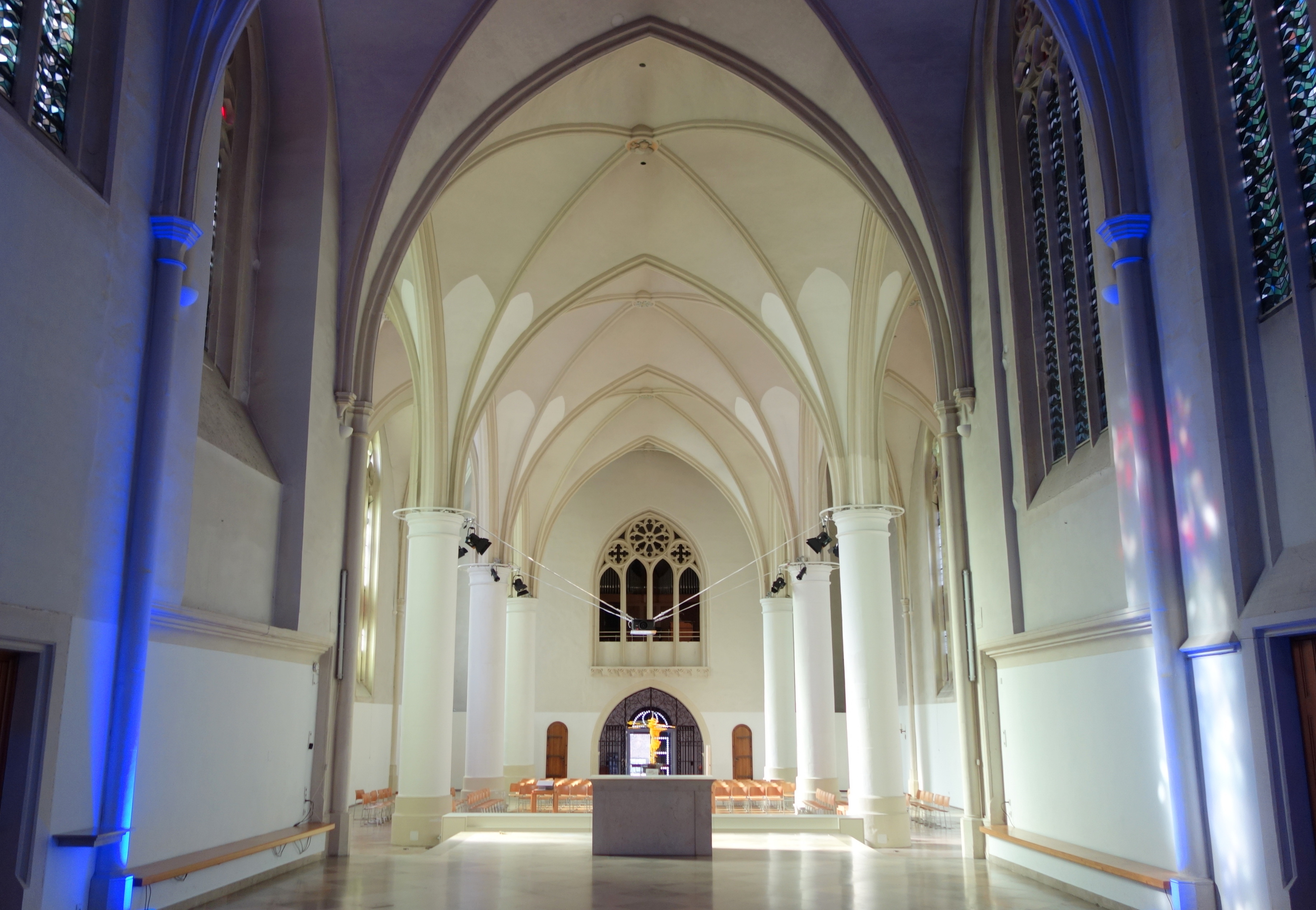 St. Martini Münster, Nordrhein-Westfalen, Deutschland